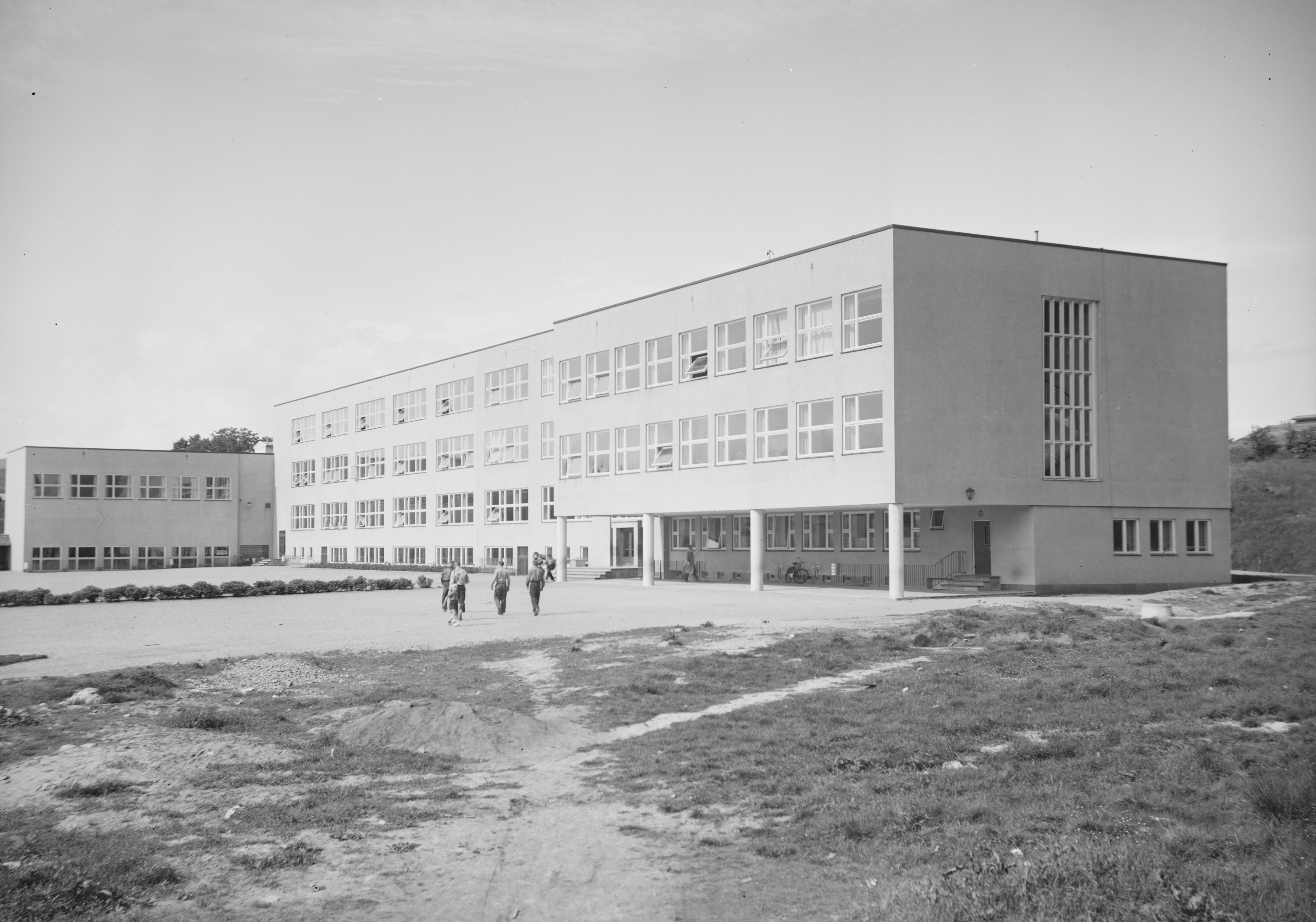 Bildet er hentet fra Nasjonalbibliotekets bildesamling. Anmerkninger til bildet var: Fotograf ukjent Kristiansand,Lund, Kristiansand, Vest Agder